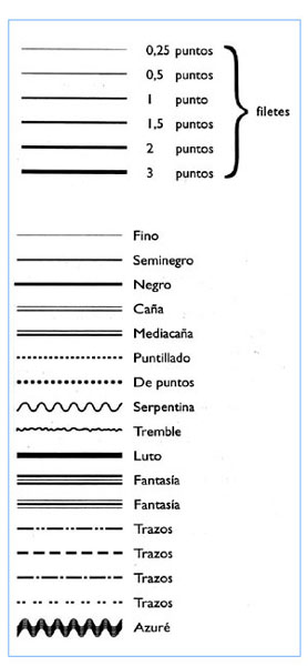 clases de filetes en la imprenta tipografica